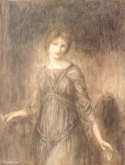 Sabdh